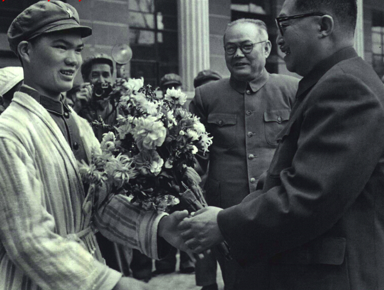 1966-04 1966年贺龙叶剑英看望麦贤得